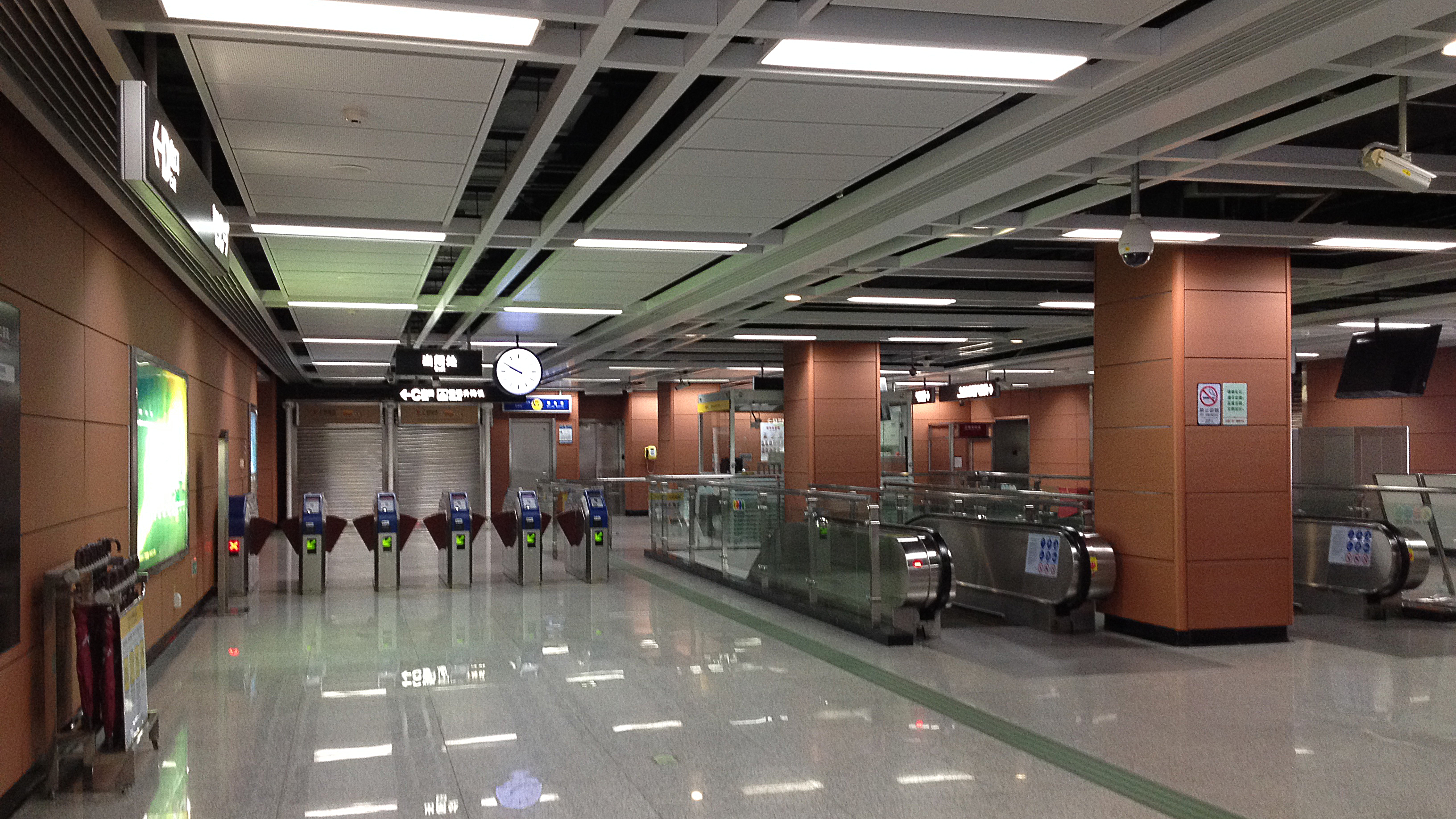 广州地铁菊树站站厅